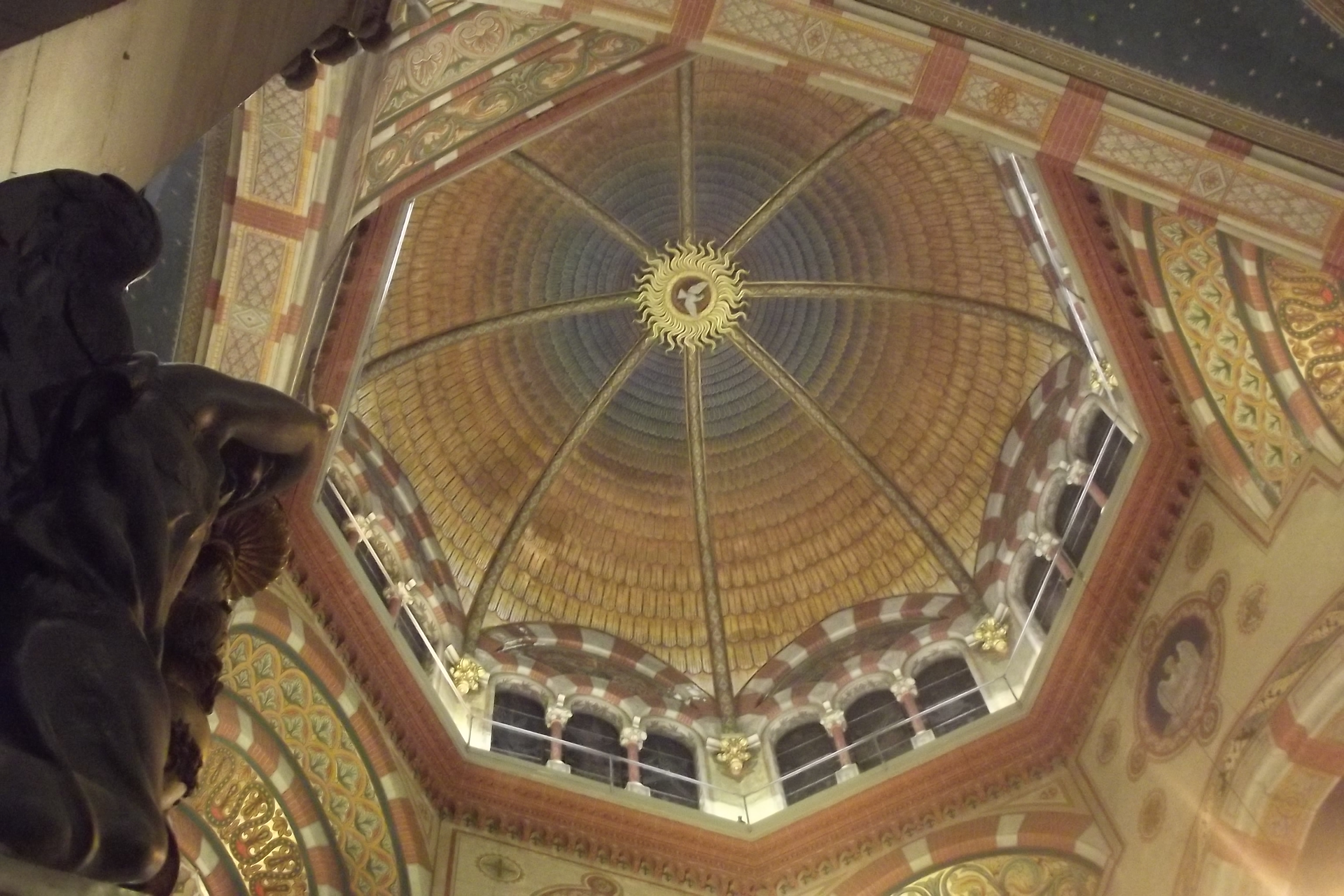 Lissone, interno della cupola della Prepositurale dei Santi Pietro e Paolo